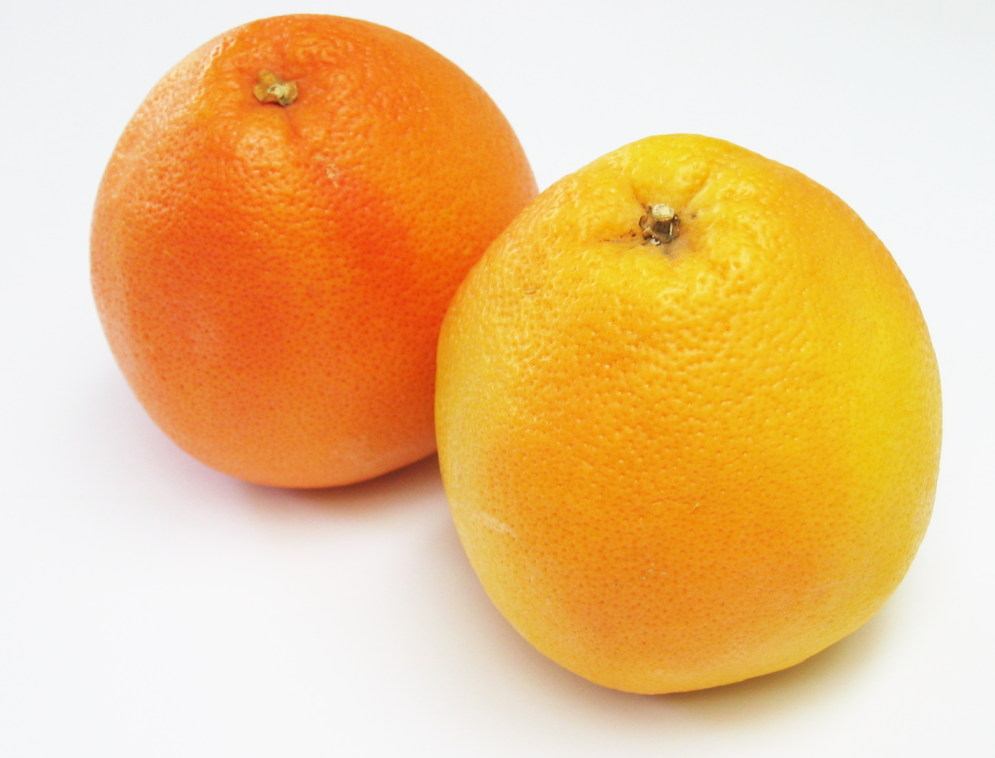 Deux pamplemousses qui sont en fait des pomelos (Citrus paradisi) ;-) Two grapefruits Photo FoeNyx - Lille 2004